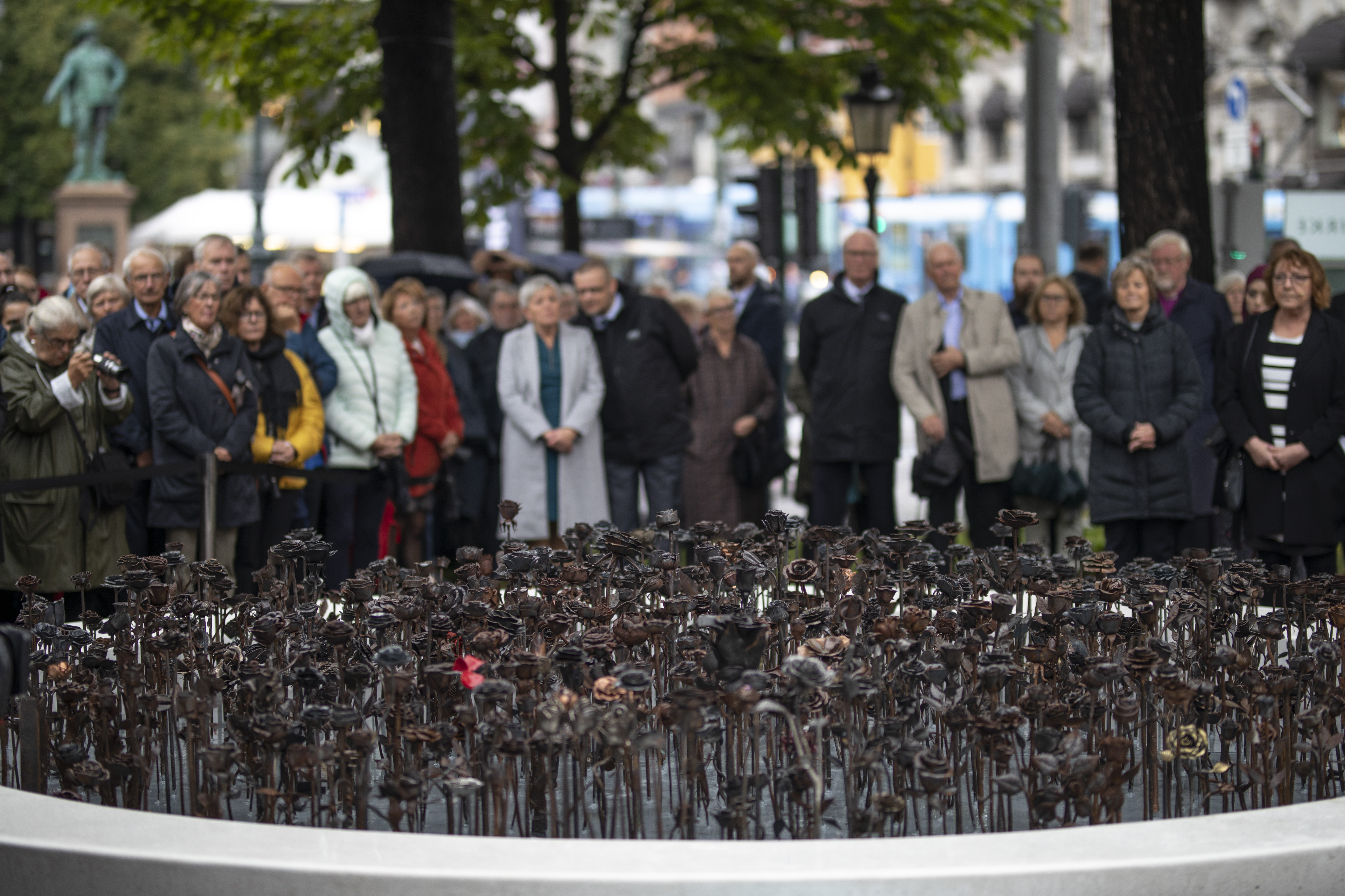 Avdukingen av minnesmonumentet «Jernrosene» utenfor Oslo Domkirke den 28. september 2019.